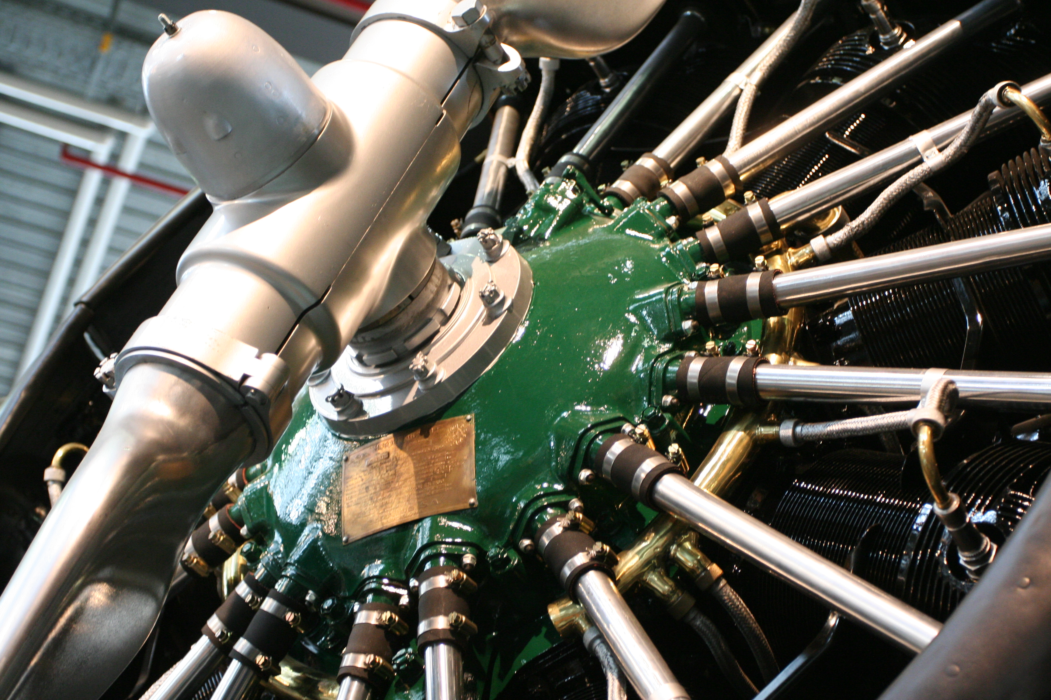 Triebwerk einer Ju-52 im Technikmuseum Berlin